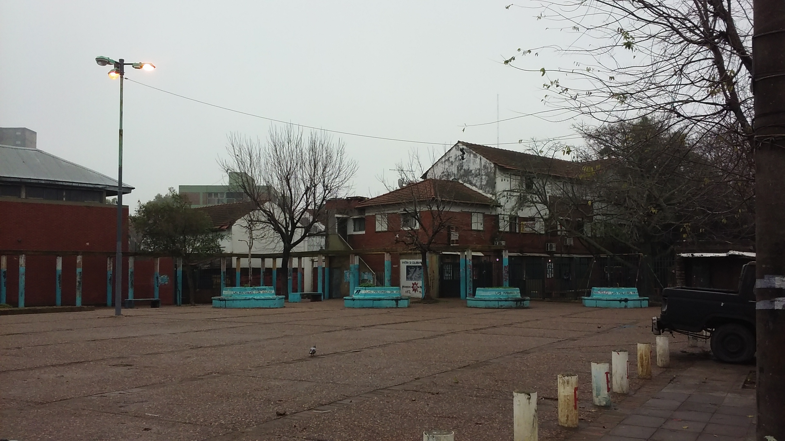 Plaza y edificio del centro comunitario del Barrio Illia, en Buenos Aires, Argentina. Incluye una Biblioteca, un Centro de Niños y Adolescentes del Gobierno de la Ciudad y el Centros de Salud y Acción Comunitaria CESAC nº 31.